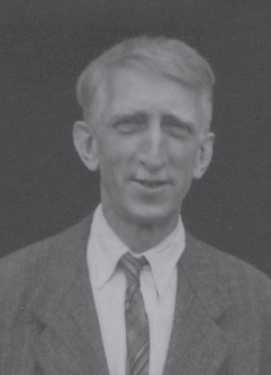 Albin Hugo Liebisch (1888 - 1965), Český konstruktér a podnikatel.